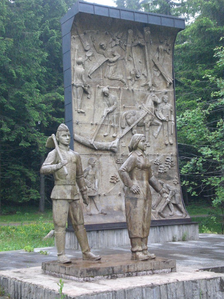 Forstarbeiterdenkmal von 1981 am Rennsteig beim Rondell in der Nähe von Oberhof